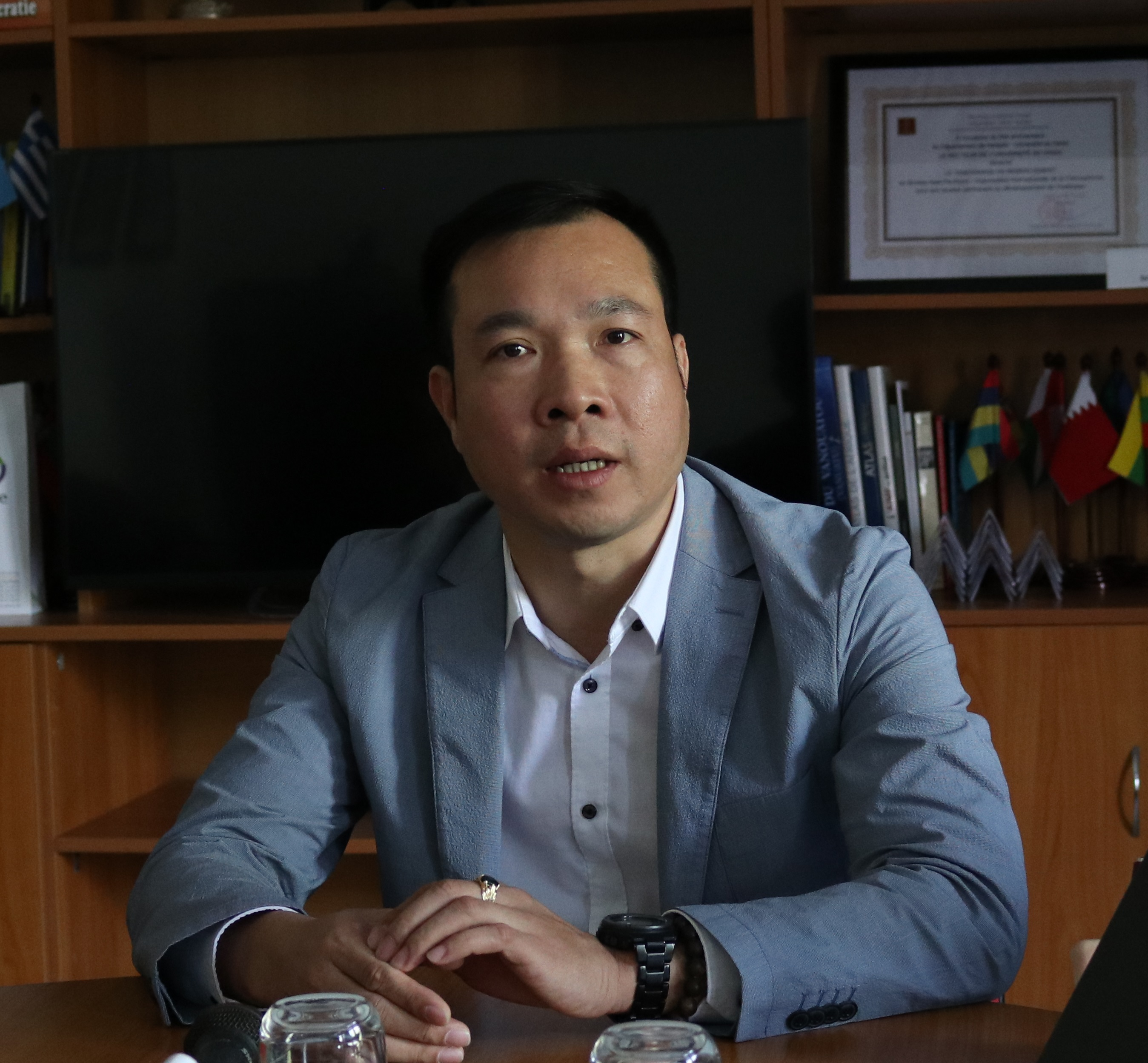 Ảnh chụp vận động viên bắn súng Hoàng Xuân Vinh, tại trụ sở Văn phòng châu Á - Thái Bình Dương, Tổ chức quốc tế Pháp ngữ (OIF) tại Hà Nội.